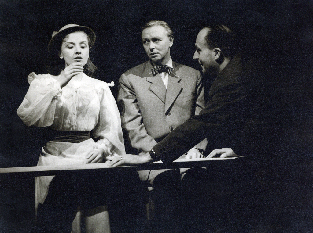 Thornton Wilder, Naše mesto, Drama SNG v Ljubljani. Na fotografiji: Mihaela Novak (Emily Webb), Drago Makuc (George Gibbs), Slavko Jan (Režiser).